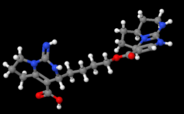 Estructura molecular tridimensional de la Batzelladina B